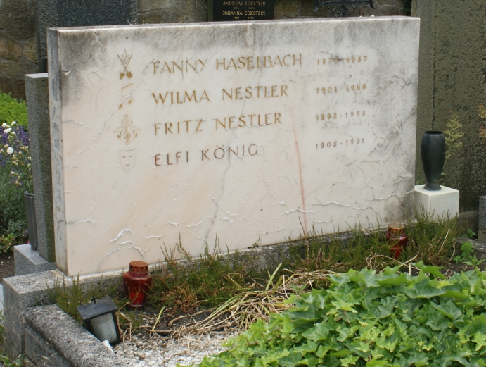 Nestler Fritz